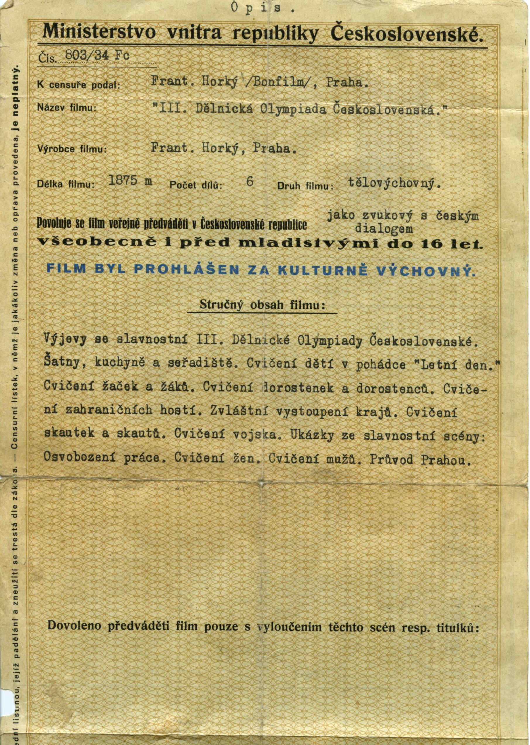 Cenzurní lístek Ministerva vnitra republiky Československé z 22. srpna 1934, film III. Dělnická Olympiada Československá